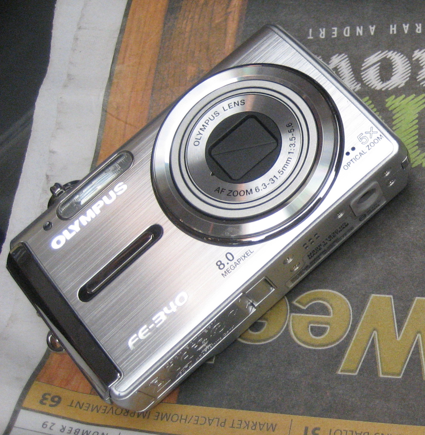 Olympus 8.0 Megapixel digital camera